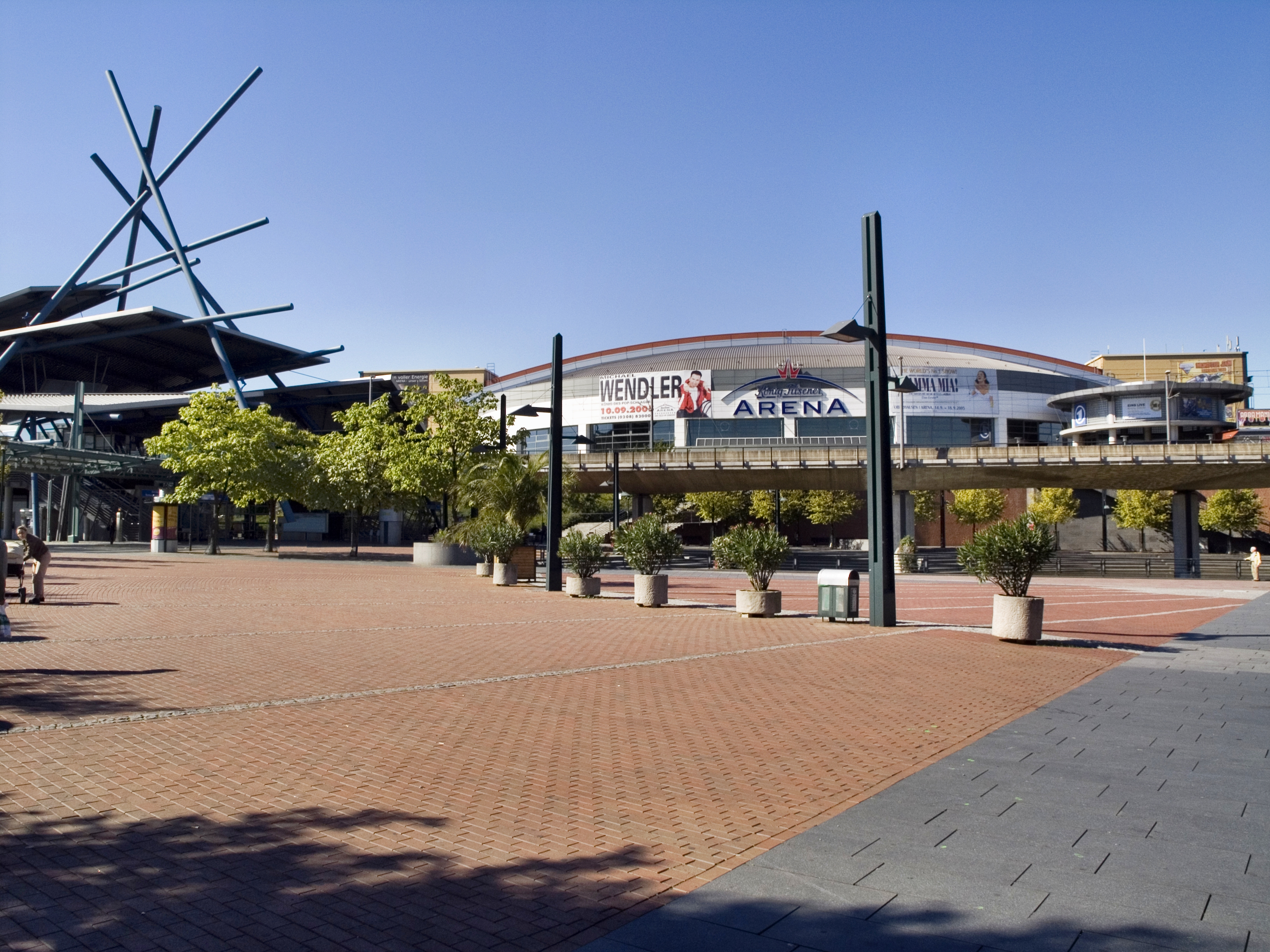 Северный Рейн - Вестфалия, Оберхаузен - König-Pilsener-Arena